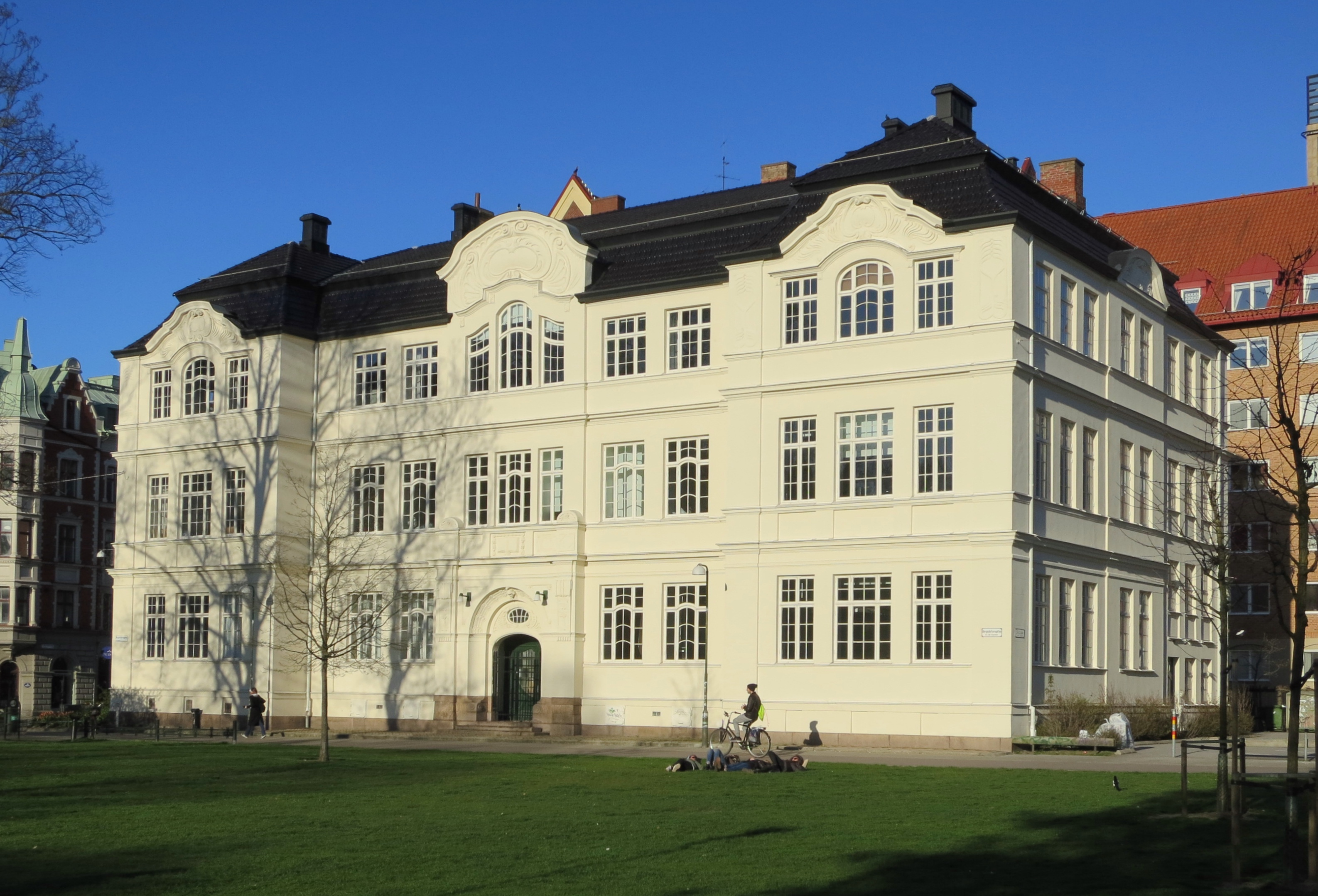 Malmö lyceum för flickor